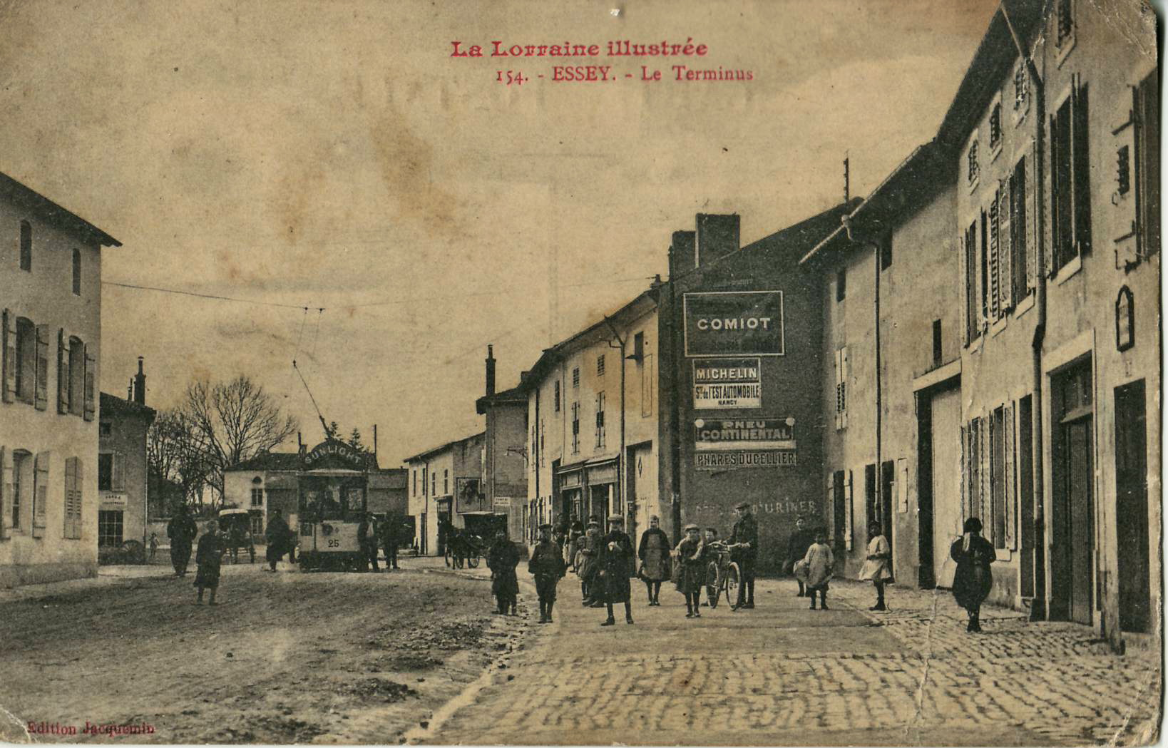 Carte postale ancienne éditée par Jacquemin, n° 154 : La Lorraine illustrée : ESSEY - Le Terminus. Motrice électrique de la ligne 3 de l'ancien tramway de Nancy